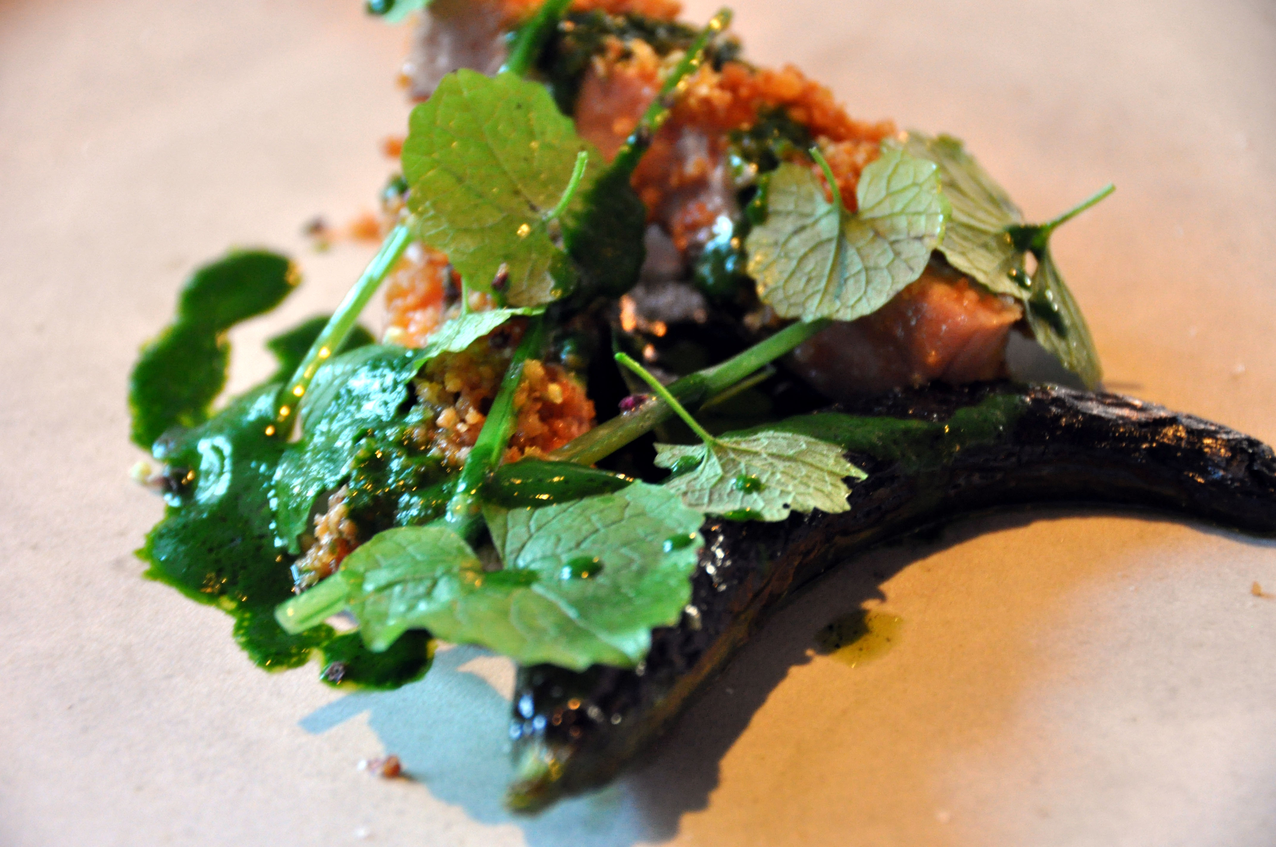 Stegt flæsk med ramsløg og grillet agurk